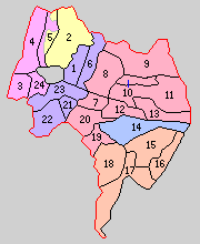 長野県諏訪郡の町村。